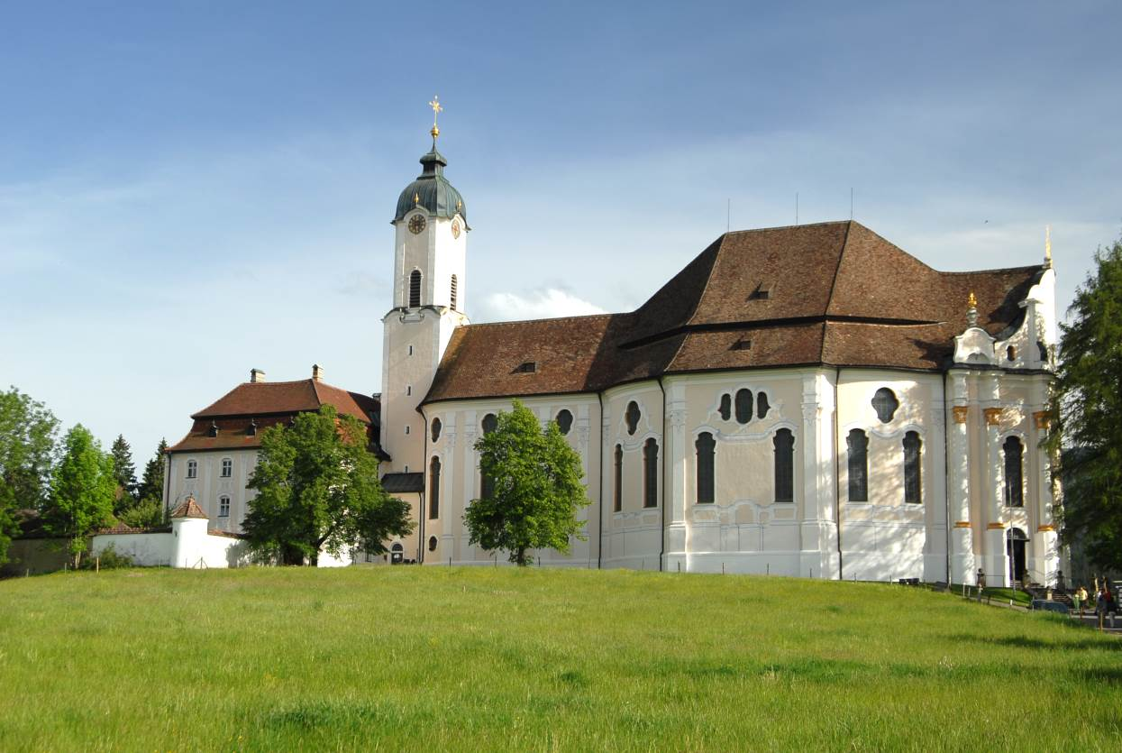 Wieskirche, Pfaffenwinkel, church bavaria, UNESCO